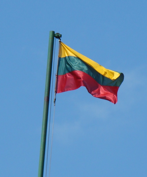 Lietuvos vėliava